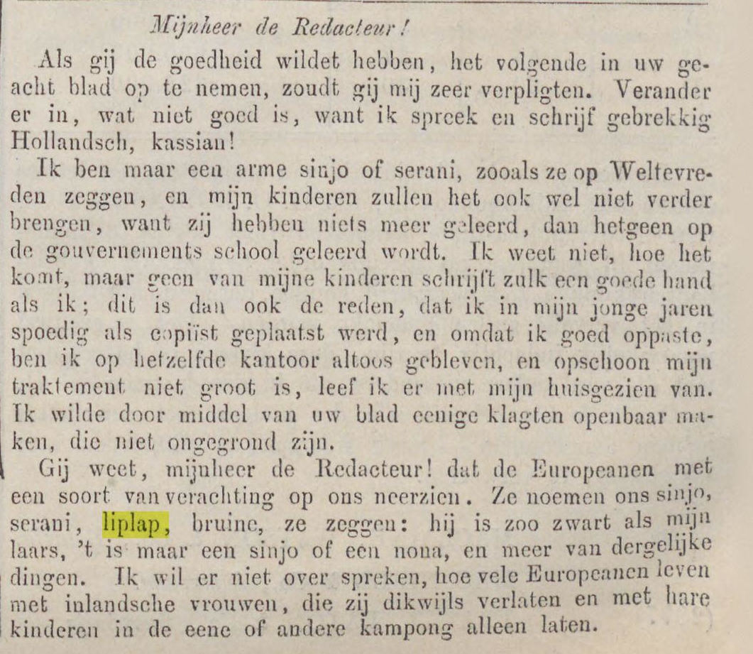 Uiteenzetting van begrippen gebruikt voor Indo-Europeanen (Java-bode 1863)